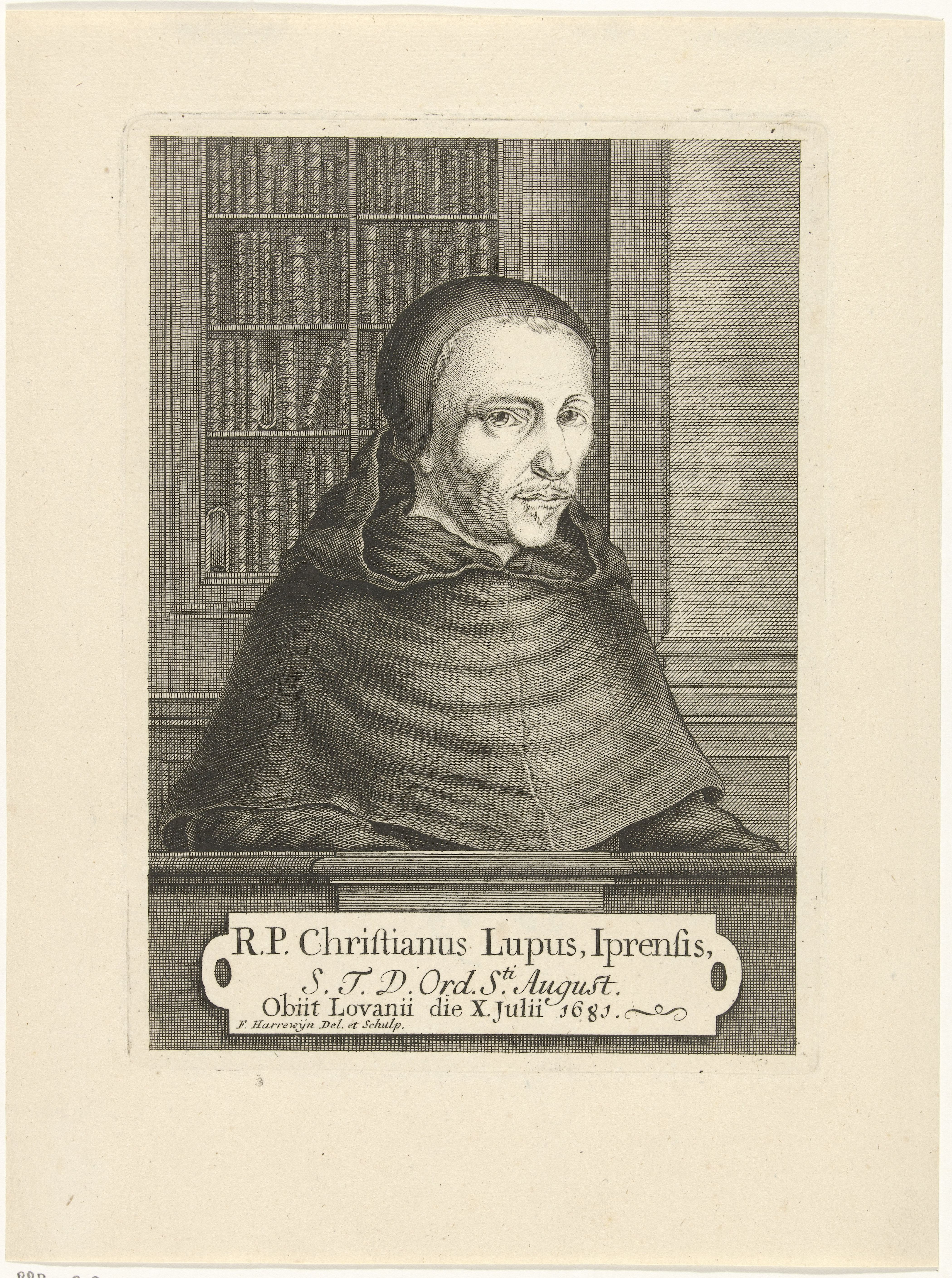 IdentificatieTitel(s): Portret van Christianus LupusObjecttype: prent Objectnummer: RP-P-1938-89Opschriften / Merken: verzamelaarsmerk, verso, gestempeld: Lugt 2228Omschrijving: Portret ten halven lijve naar rechts van de monnik en godgeleerde Christianus Lupus voor een boekenkast. Onder zijn portret een plint Waar: op zijn gegevens in drie regels in het Latijn.VervaardigingVervaardiger: prentmaker: François Harrewijn (vermeld op object)naar eigen ontwerp van: François Harrewijn (vermeld op object)Plaats vervaardiging: Brussel (mogelijk)Datering: ca. 1710 - 1764Fysieke kenmerken: gravure en etsMateriaal: papier Techniek: graveren (drukprocedé) / etsenAfmetingen: plaatrand: h 194 mm × b 143 mmOnderwerpWat: scholar in his studyWie: Christianus LupusVerwerving en rechtenVerwerving: onbekend 1938Copyright: Publiek domein